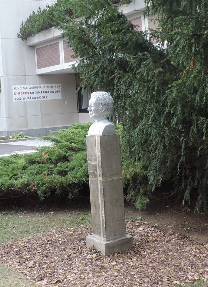 Denkmal Mater M. Schörl in St. Pöten